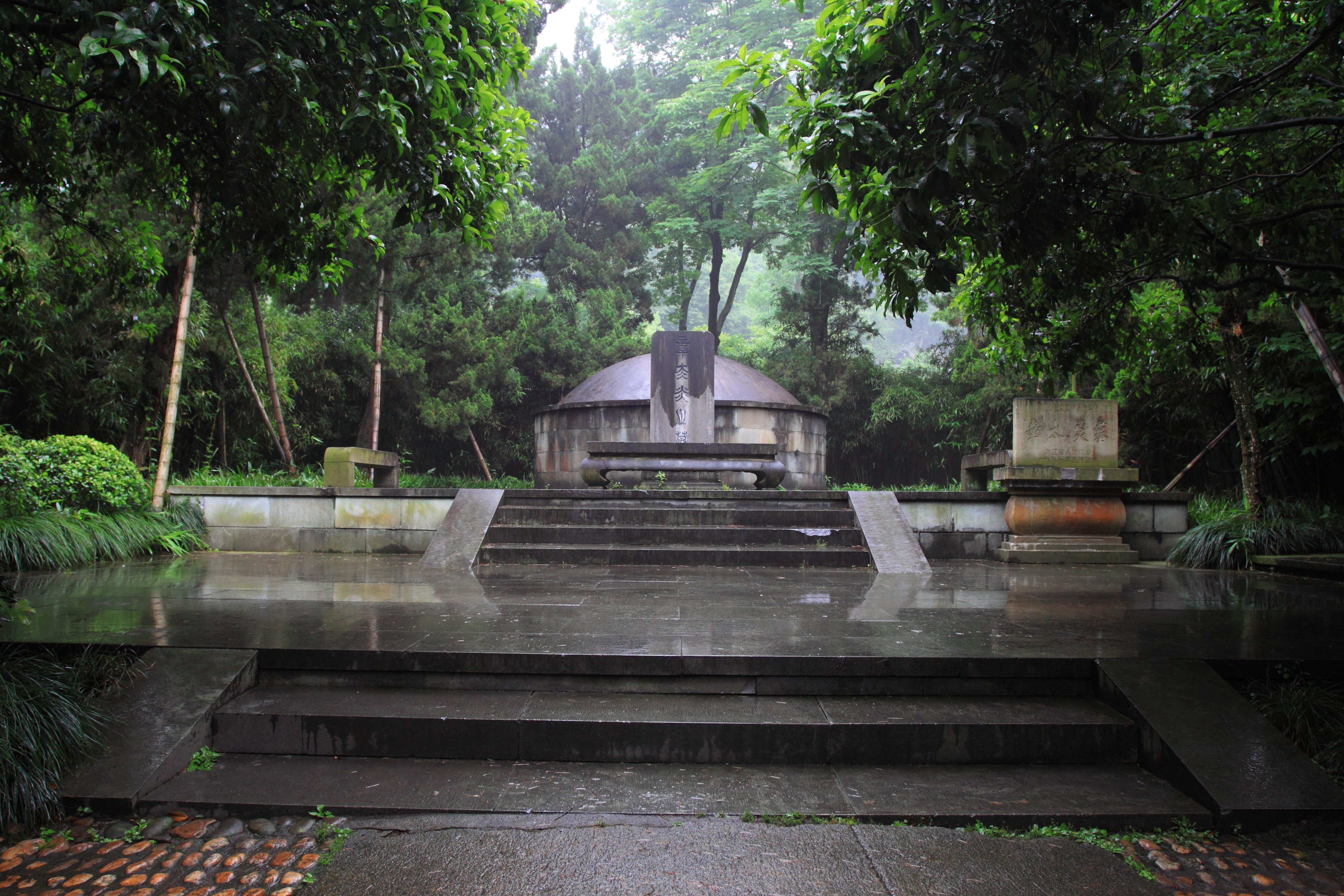 章炳麟（太炎）墓，位于中国浙江省杭州市。